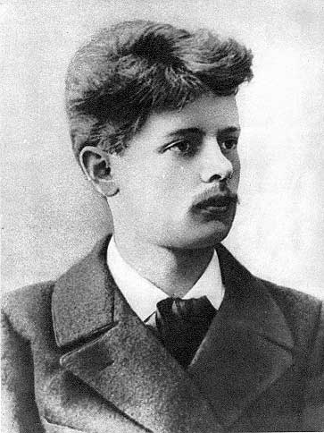 Павел Петрович Бажов во время учебы в Пермской духовной семинарии